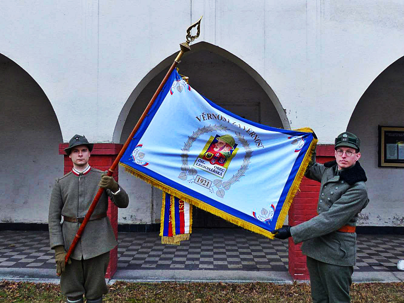 Líc praporu jednoty ČsOL Ostrava 1